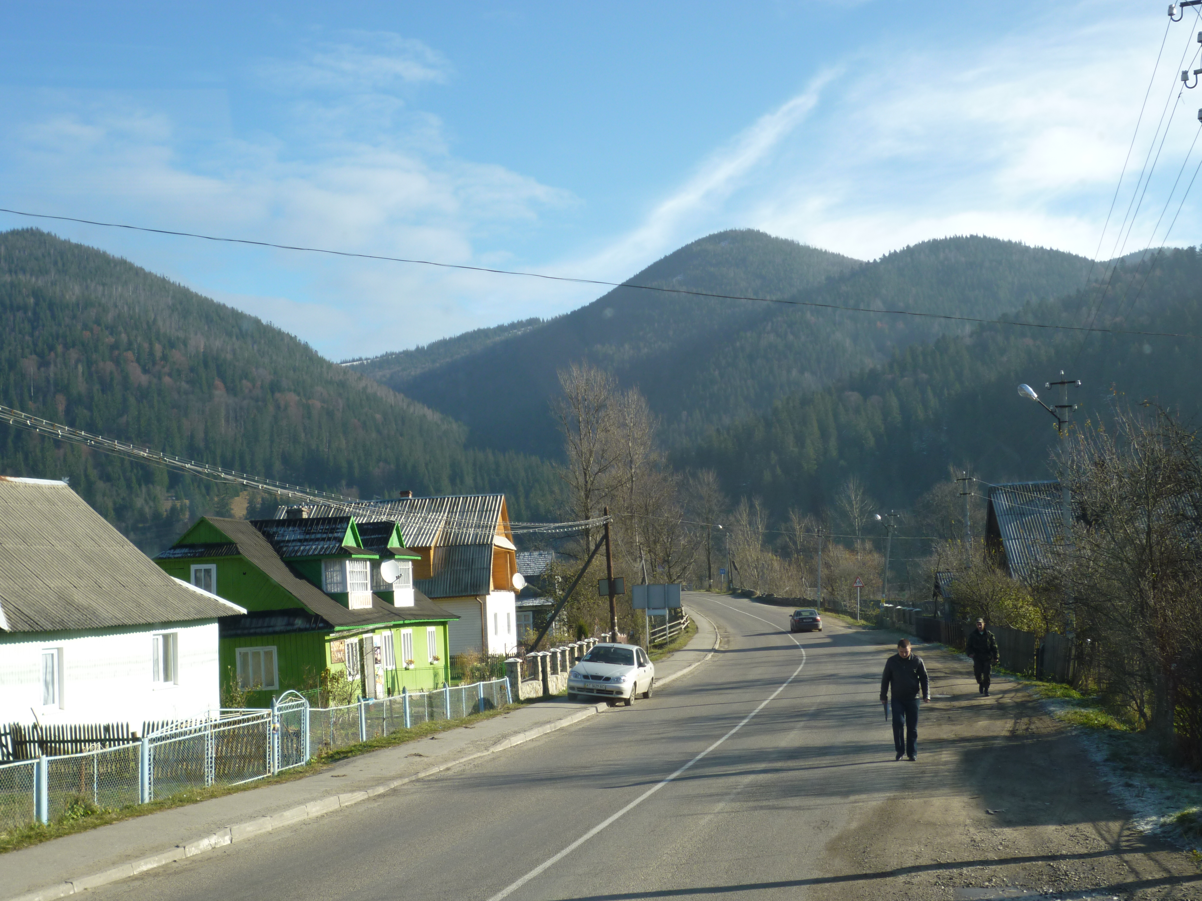 фото с. ТАТАРІВ (?) Яблуниця